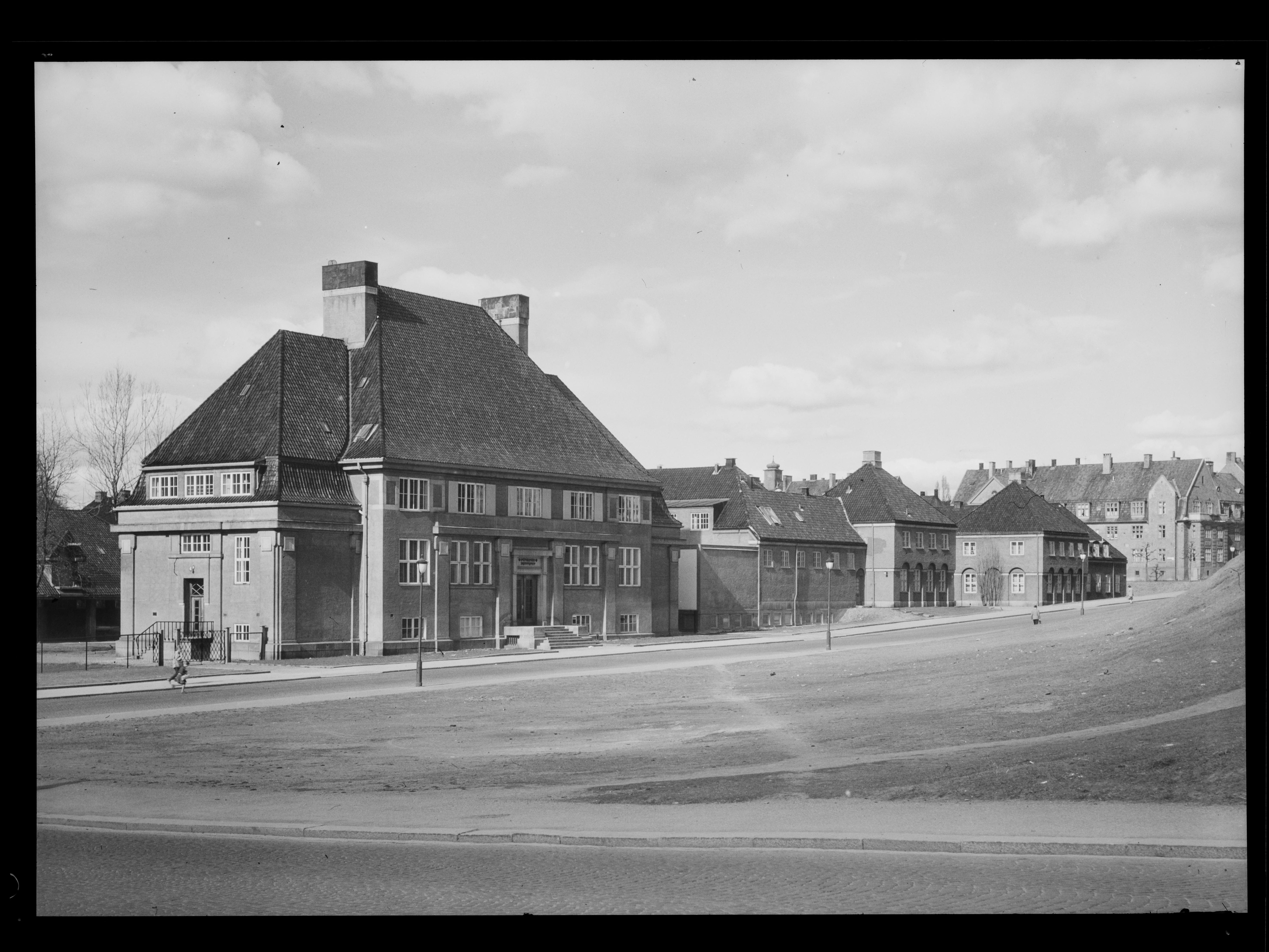 Bildet er hentet fra Nasjonalbibliotekets bildesamling. Anmerkninger til bildet var: Fotograf: GE Oslo, Oslo, Oslo